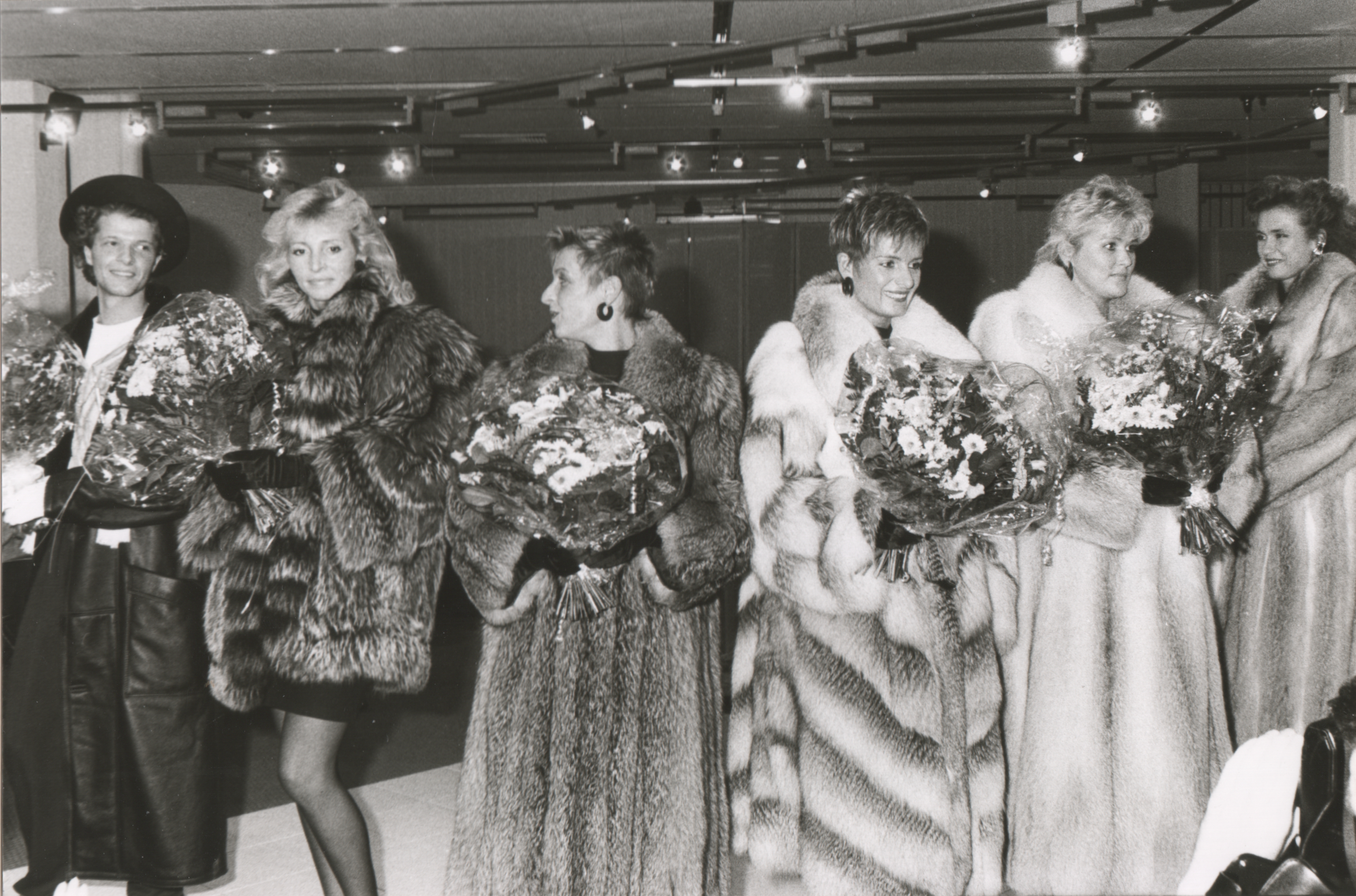 Modenschau der Firma Pelzmodelle Kuhn, Klaus-Peter Kuhn, Düsseldorf im Italia Trade Center Düsseldorf, Italienisches Institut für Außenhandel, I. C. E., Luisen- Ecke Talstraße. Von links: Nappierter Chekianglamm Herrenmantel Silberfuchsjacke Bluefrost Fuchsmantel (Gabriele Kroke) Fawnlight Fuchsmantel (Erika Kroke) Fawnlight Fuchsmantel Golden Island Fuchsmantel (Daniela Limmer)